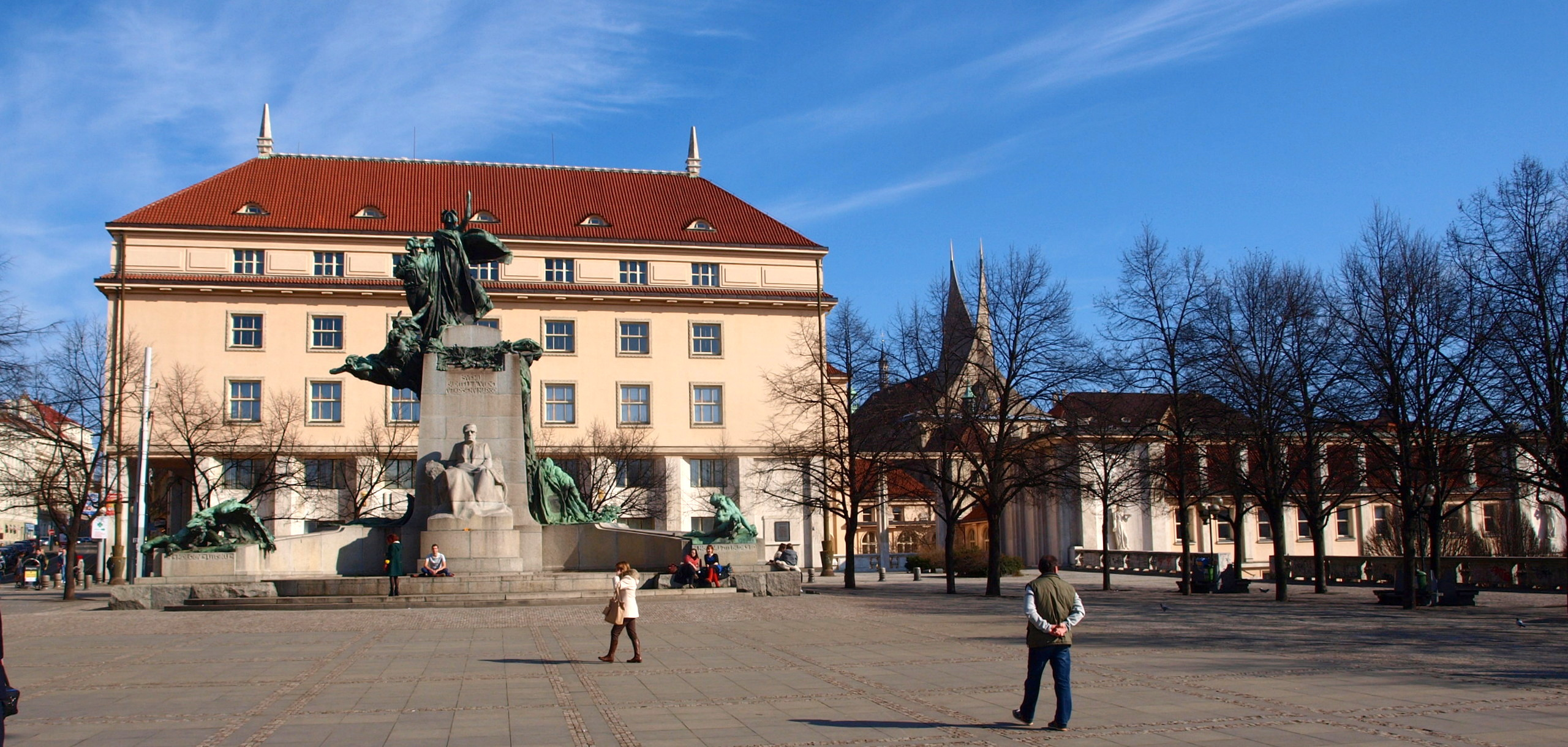 Palackého náměstí Praha